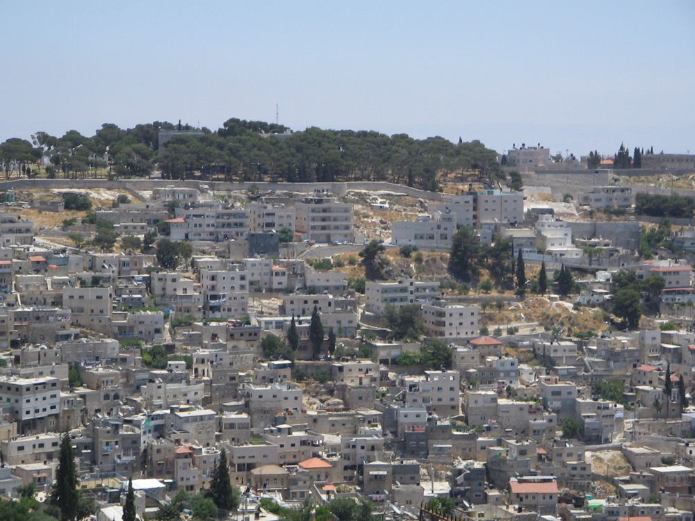 Арабская застройка Масличной горыАрабская деревня Рас эль Амуд на склоне Масличной горы, часть т.н. восточного Иерусалима. Это не масличная гора, а Армон анацив (дворец наместника).